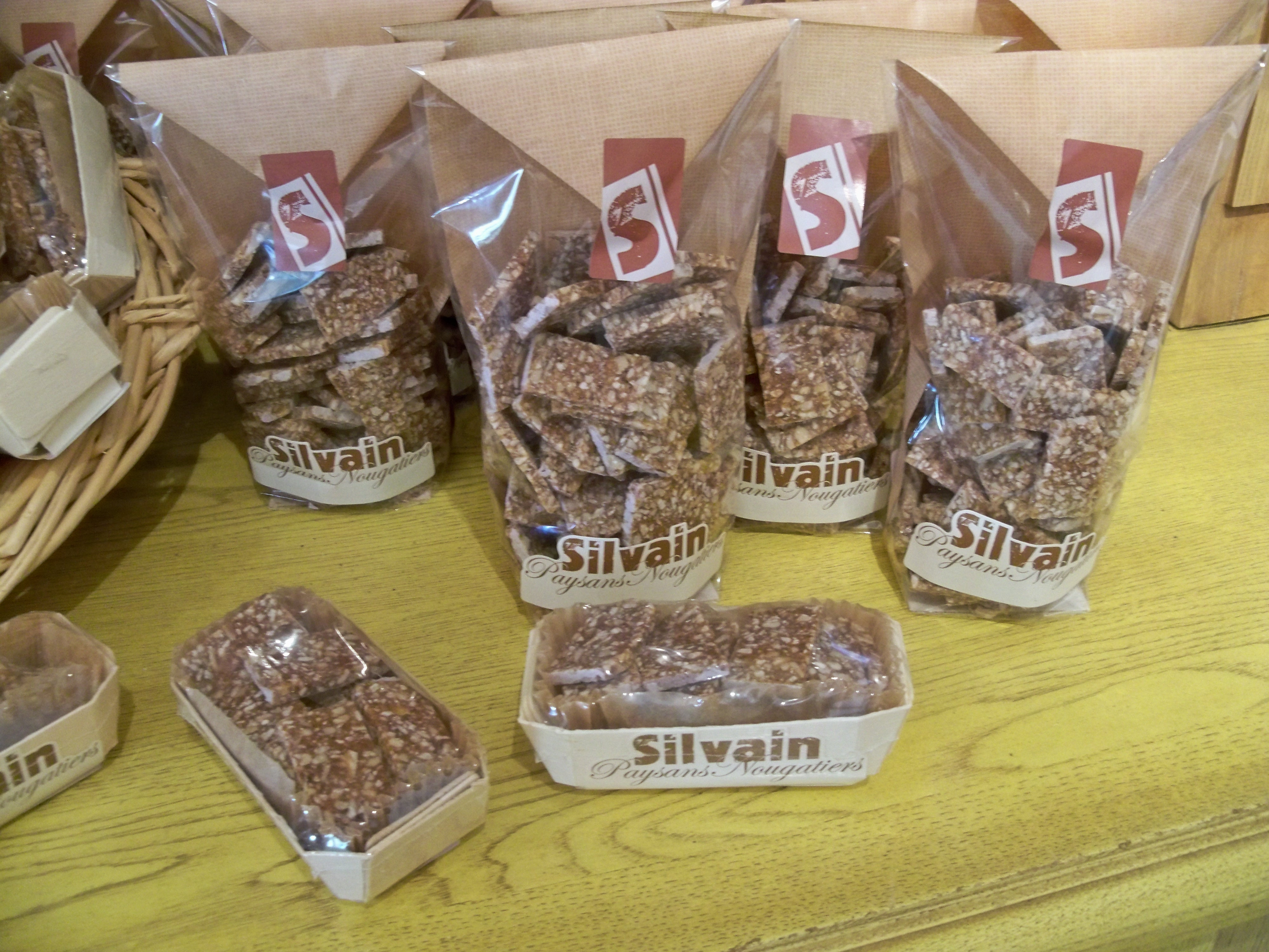 Nougatine de Saint Didier, Vaucluse, France